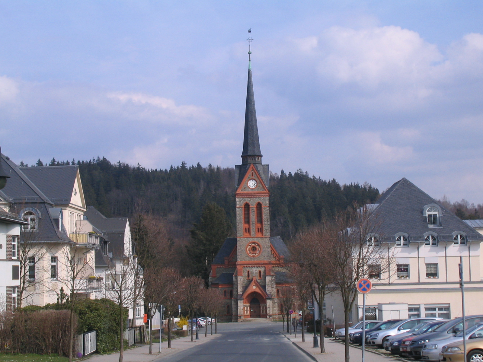 evangelische St.-Trinitatis-Kirche in Bad Elster, Kirchstraße